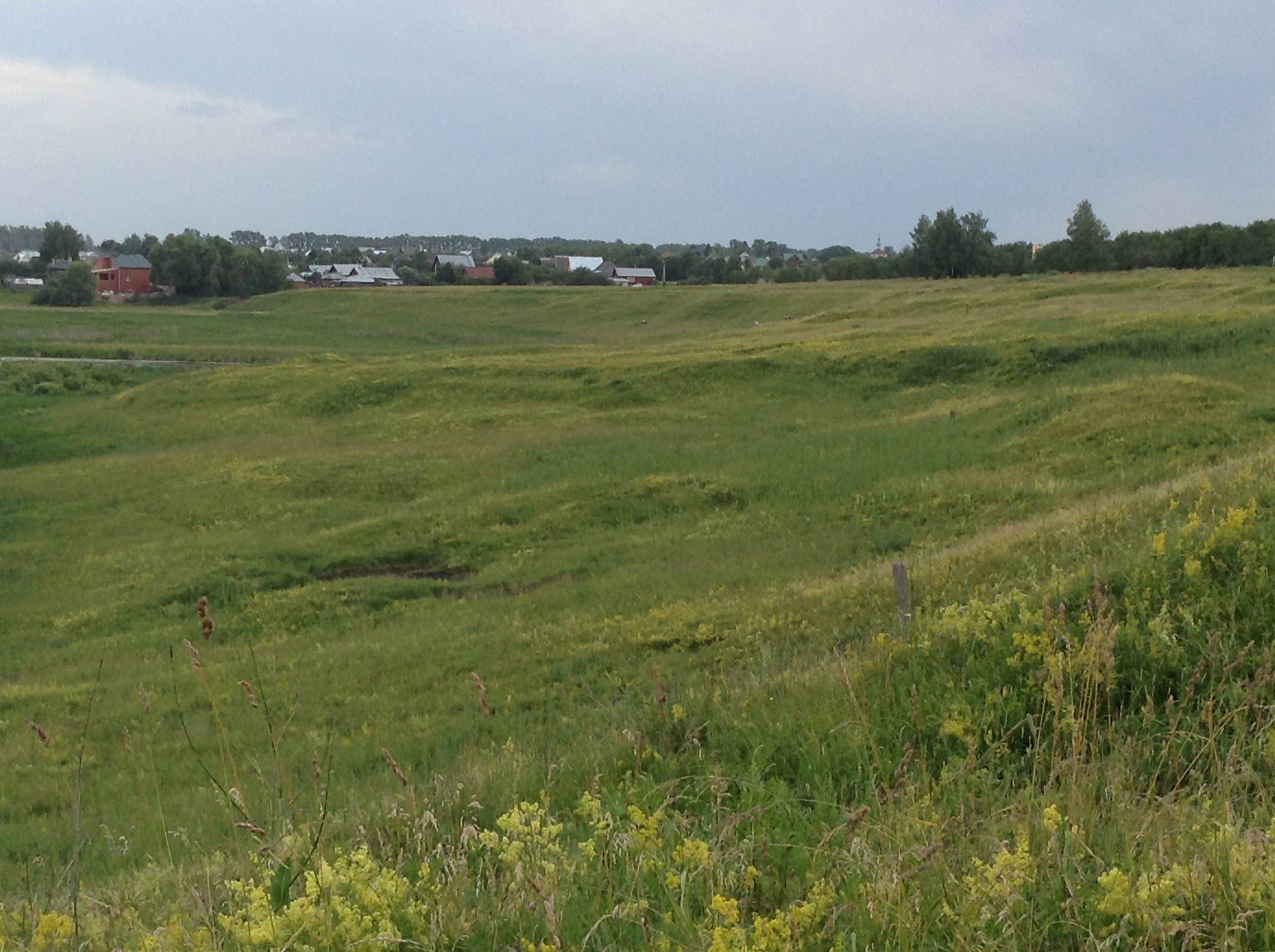 Ильинский луг, Суздальский район This image is related to the protected area of Russia number 3310253